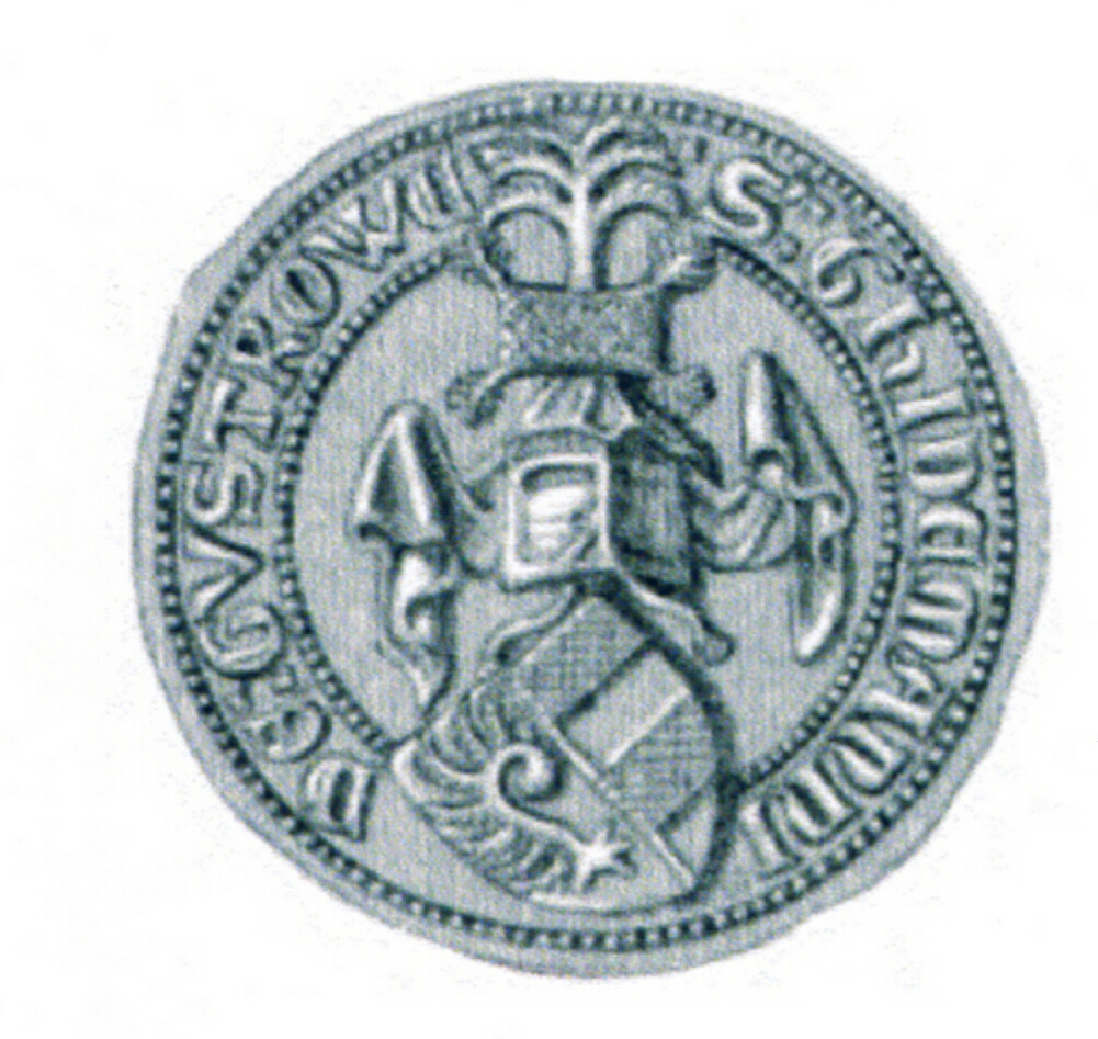 Siegel des Tidemann von Güstrow. Das Siegel stammt aus der Zeit um 1347. Siehe Emil Ferdinand Fehling: Lübeckische Ratslinie, Nr. 344 (Tidemann von Güstrow, BM 1347).